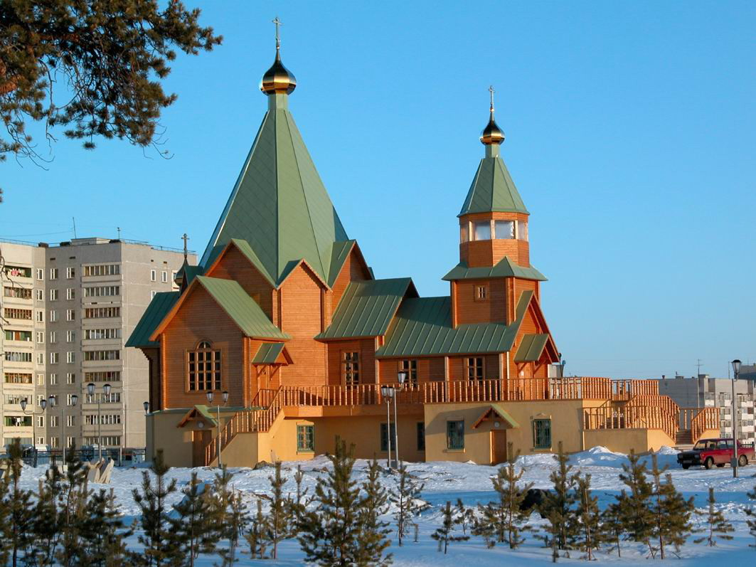 Свято-Троицкая церковь в Полярных Зорях